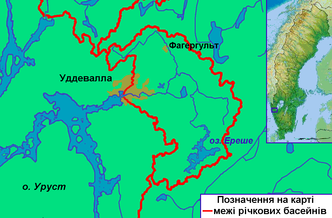 Карта річки Бевеон на півдні Швеції у лені Вестра-Йоталанд. Створено на основі карти річок лену Вестра-Йоталанд Västra Götalands län на сайті SMHI Шведського інституту метеорології та гідрології і карти басейну річки Бевеон Avrinningsområde nr 109-Bäveån на сайті Використано карту File:Sweden relief location map.jpg.